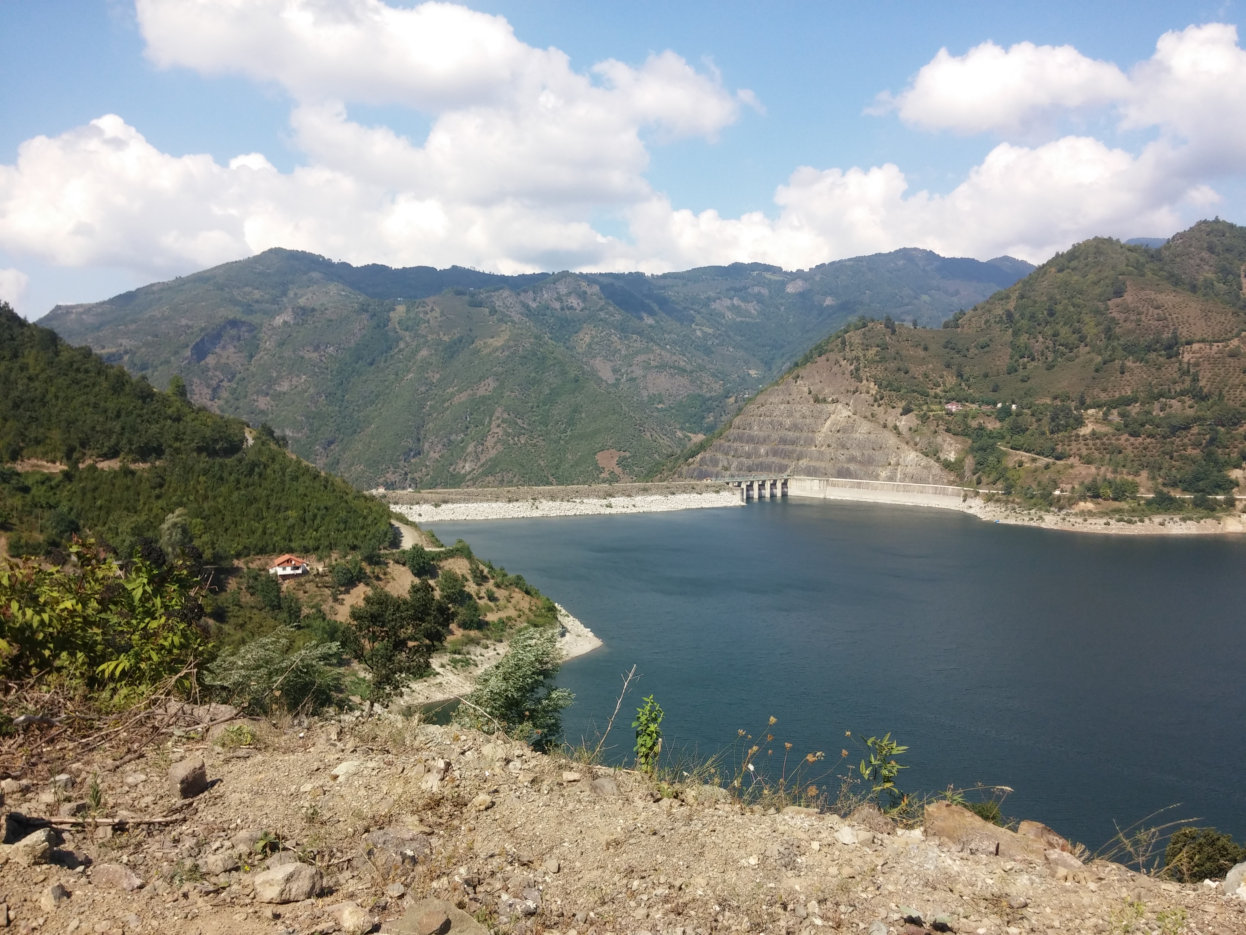 Hasan Uğurlu Barajı kapakları.